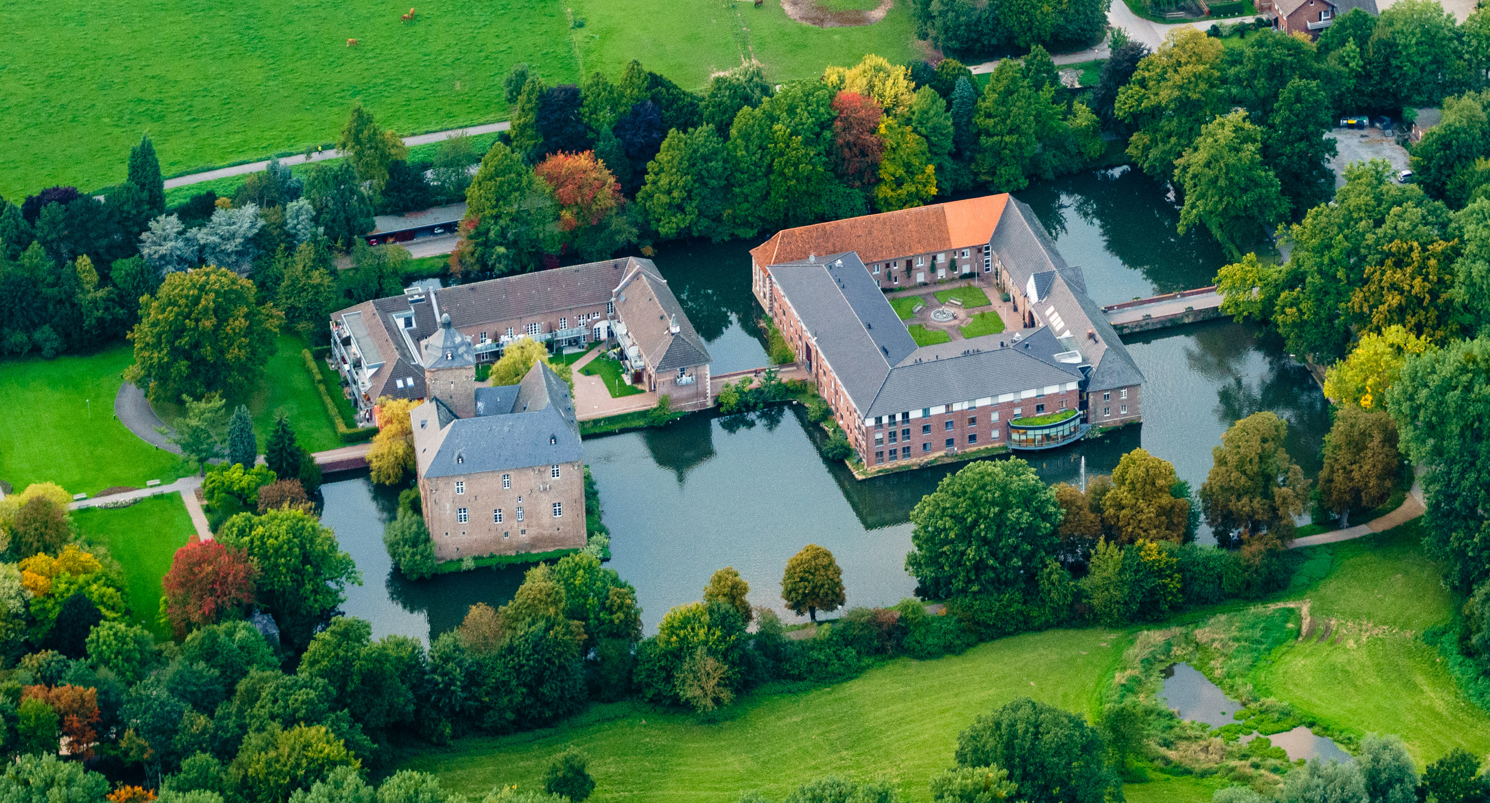 Schloss Trips, September 2015, Luftaufnahme aus Südost